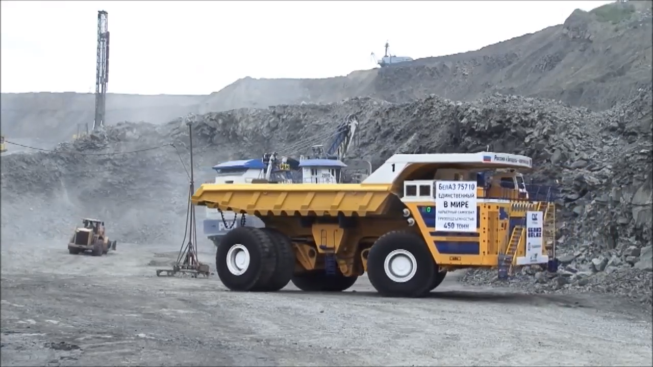 БелАЗ 75710 в Черниговском разрезе, Кемеровская область